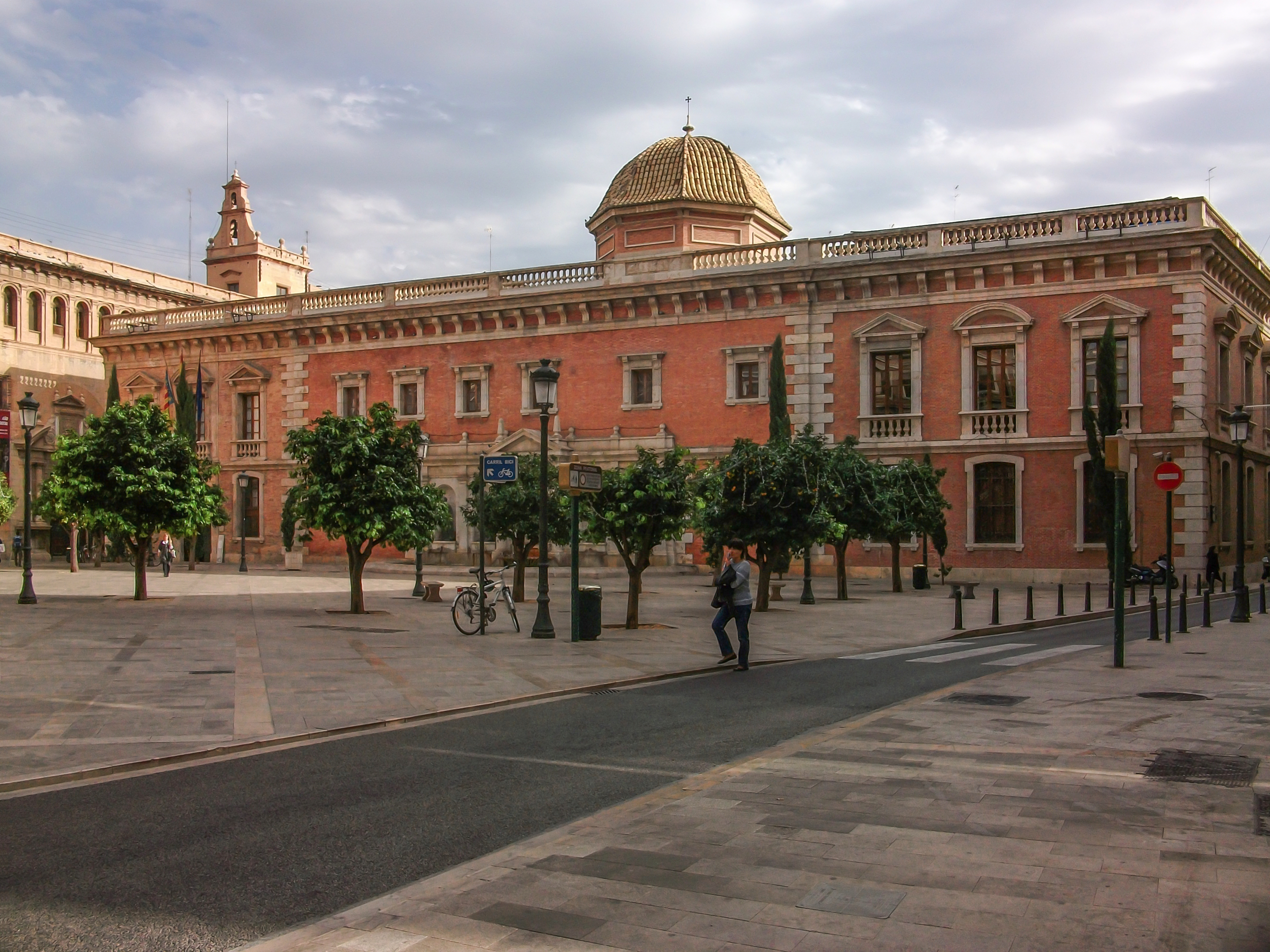 Vista de l'edifici de La Nau, actual centre cultural de la Universitat de València, des de la Plaça del Patriarca.